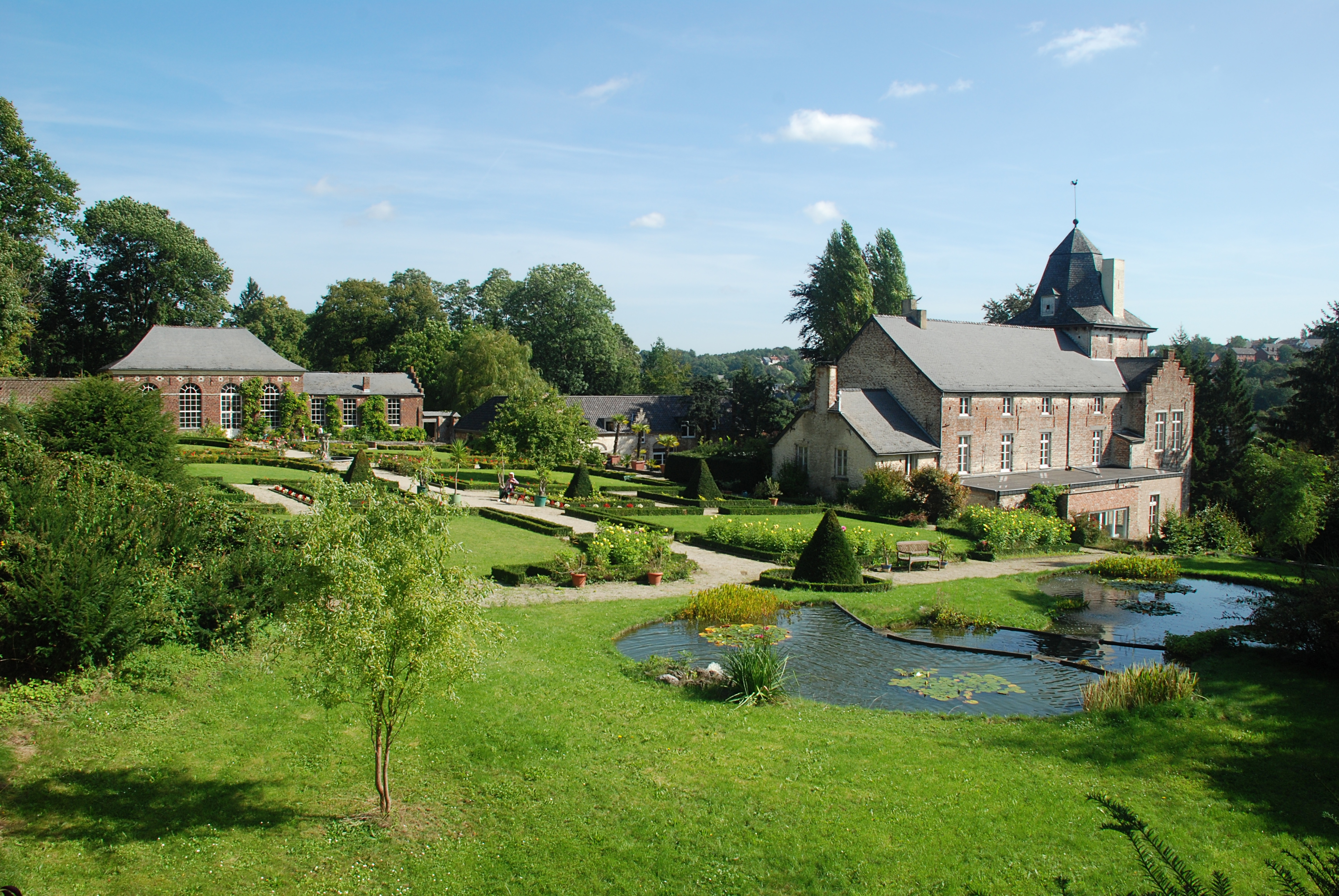 Belgique - Wallonie - Château d'Ottignies